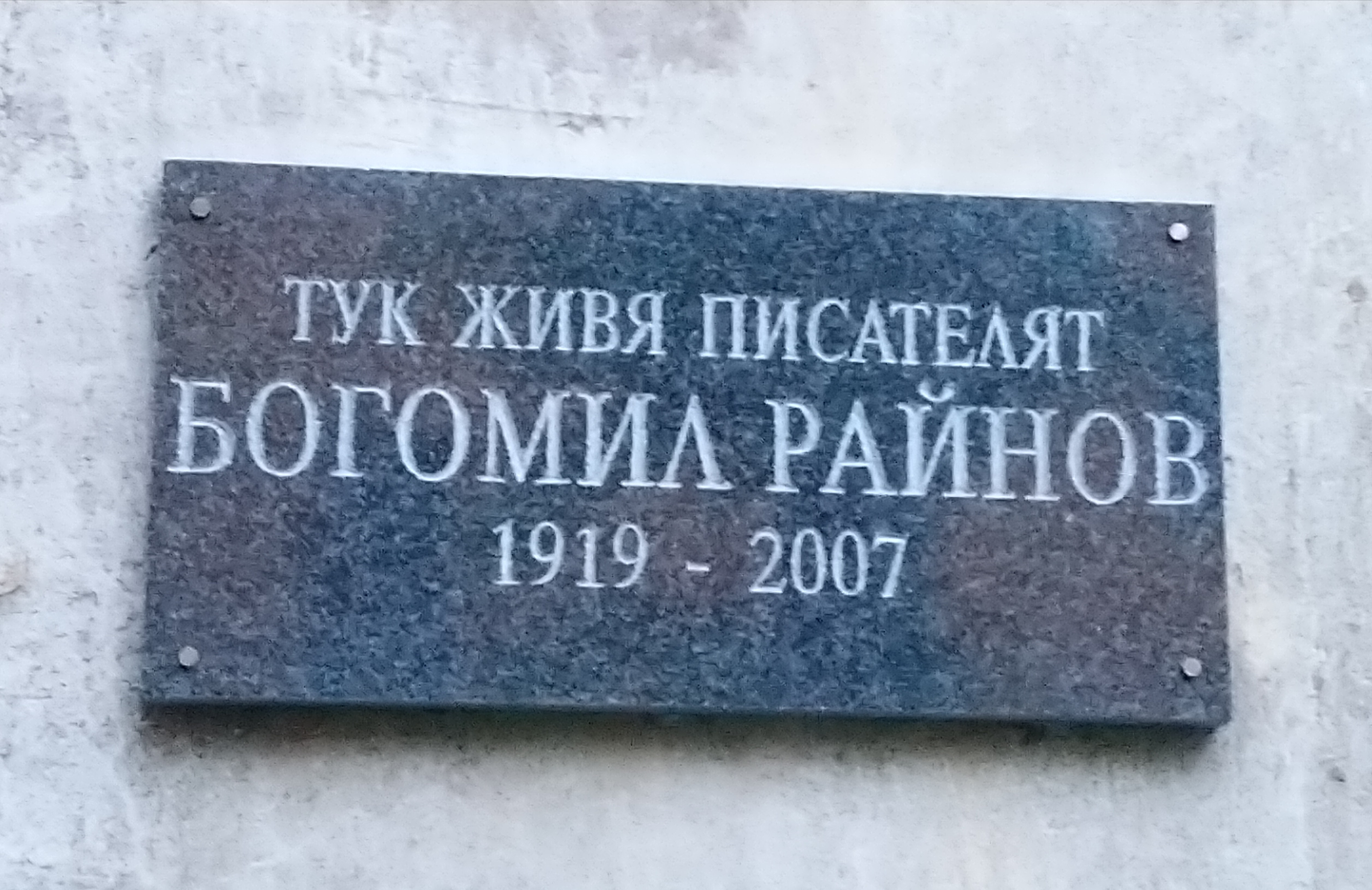 Паметна плоча на писателя Богомил Райнов, ул. Елин Пелин 32, София